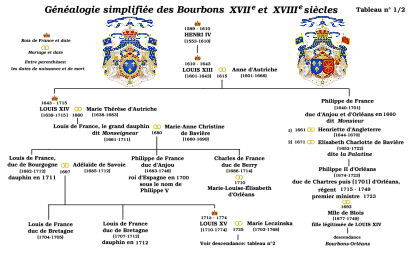 Tableau généalogique simplifié de la dynastie des Bourbons de France